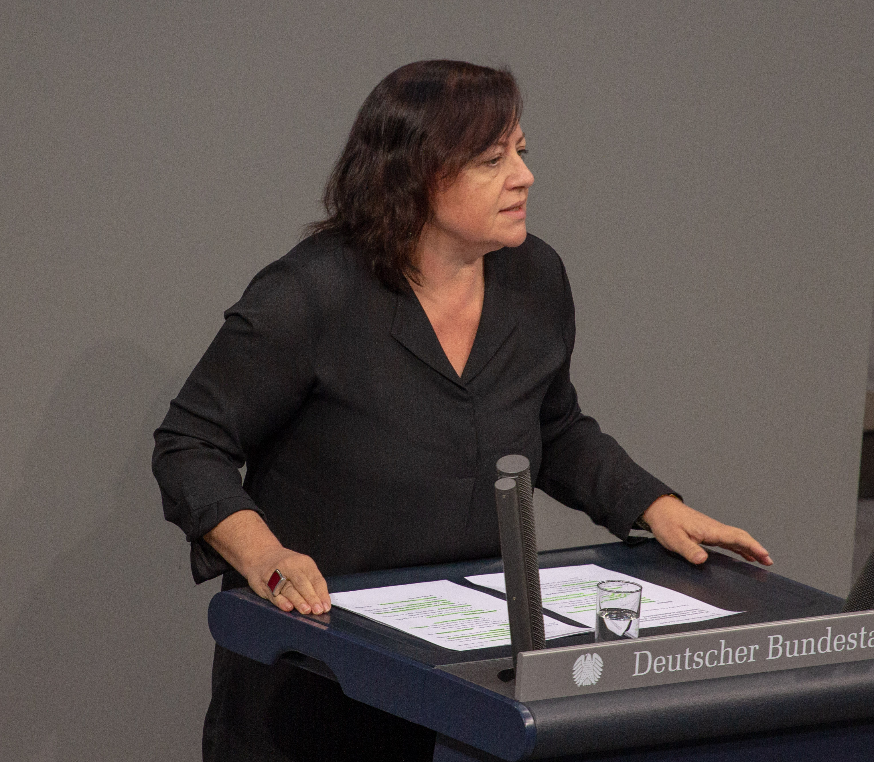 Bärbel Kofler, Mitglied des Deutschen Bundestages, während einer Plenarsitzung am 11. April 2019 in Berlin.